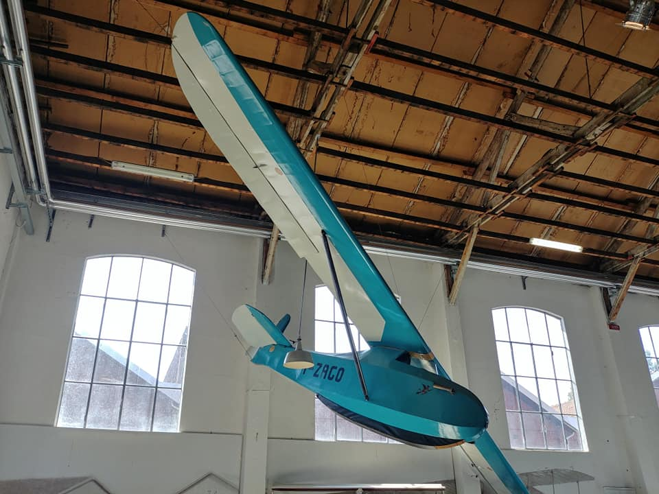 L'aliante CAT 20